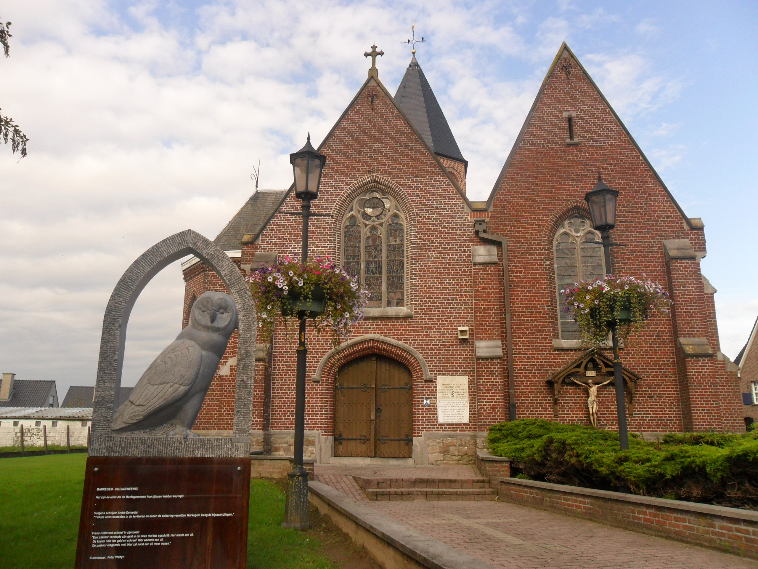 Gerenoveerde kerk met nieuwe standbeeld 'De Uil'